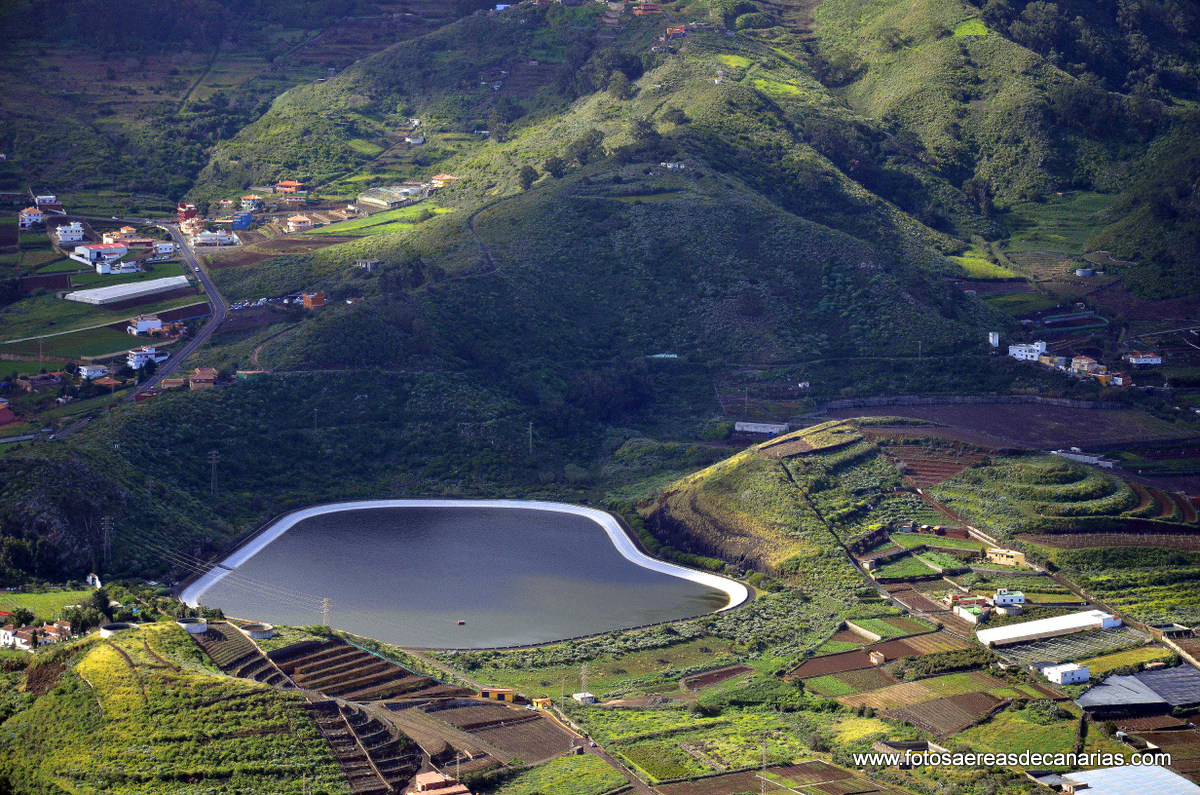 Foto aérea de la charca de Molina, el Socorro